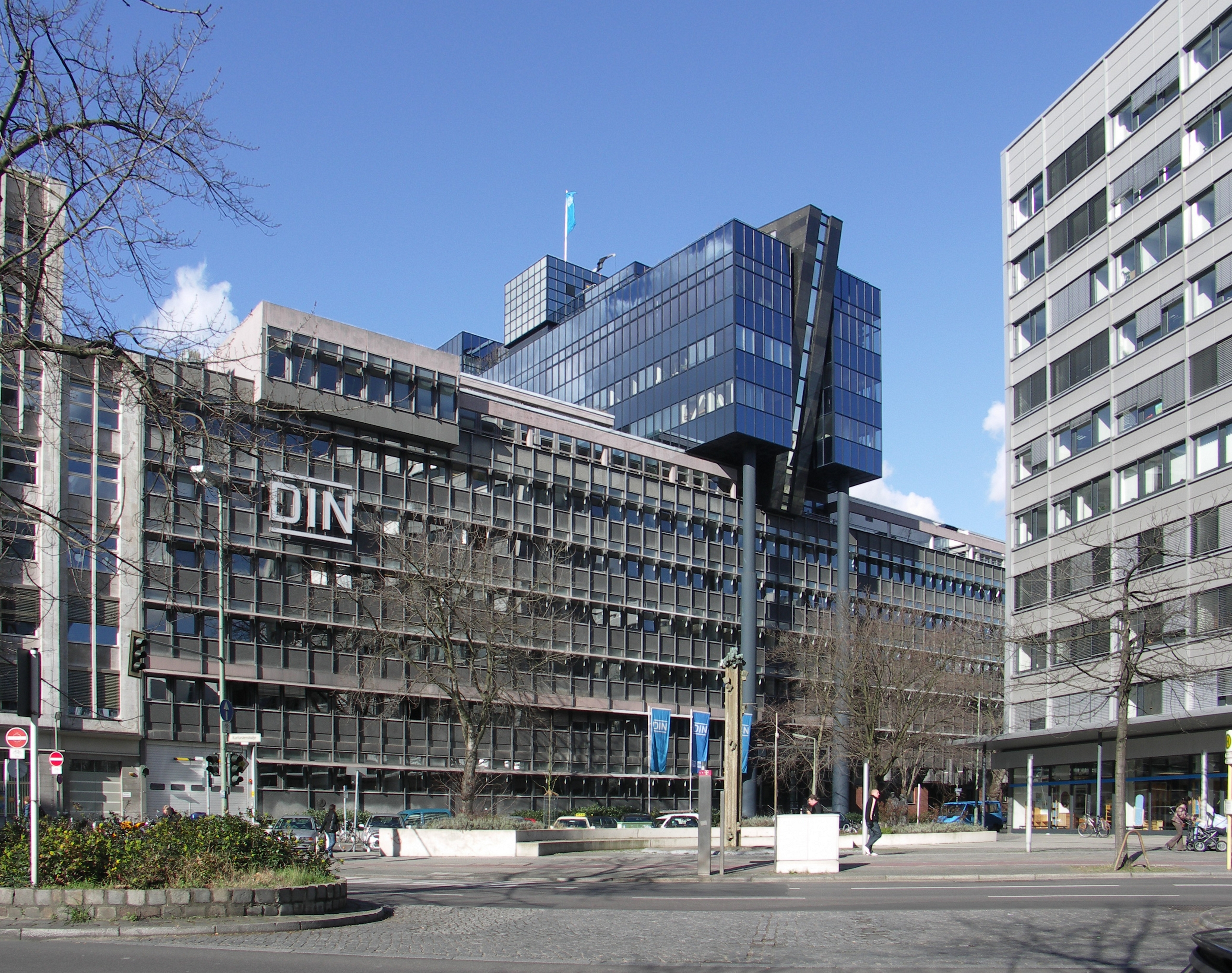 Sitz des DIN (Deutsches Institut für Normung e. V.) in der Berliner Burggrafenstraße, aufgenommen von der Kurfürstenstraße mit Blick in nördliche Richtung